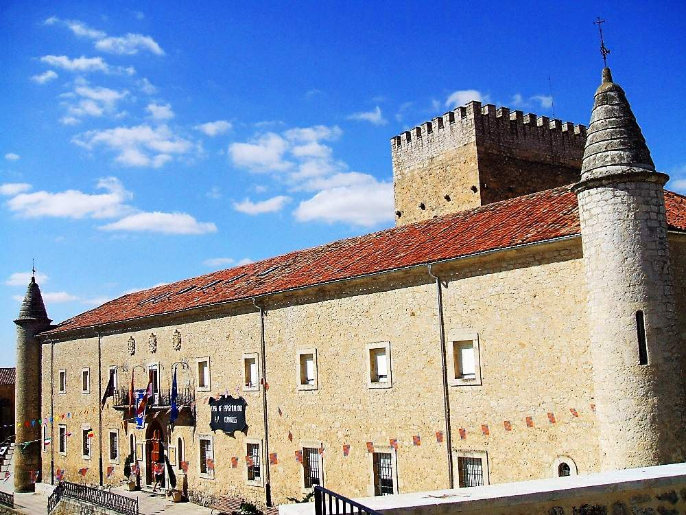 Convento de los Dominicos, Caleruega